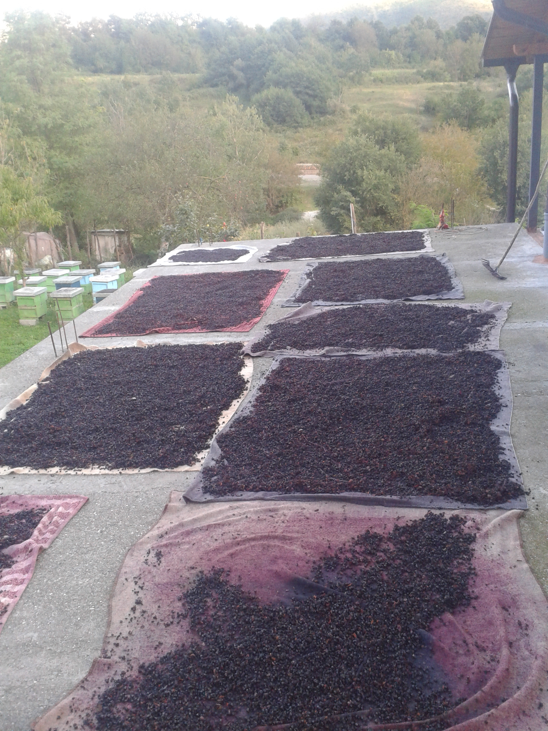 Bima medicinale e boronices ne procesin e tharjes.